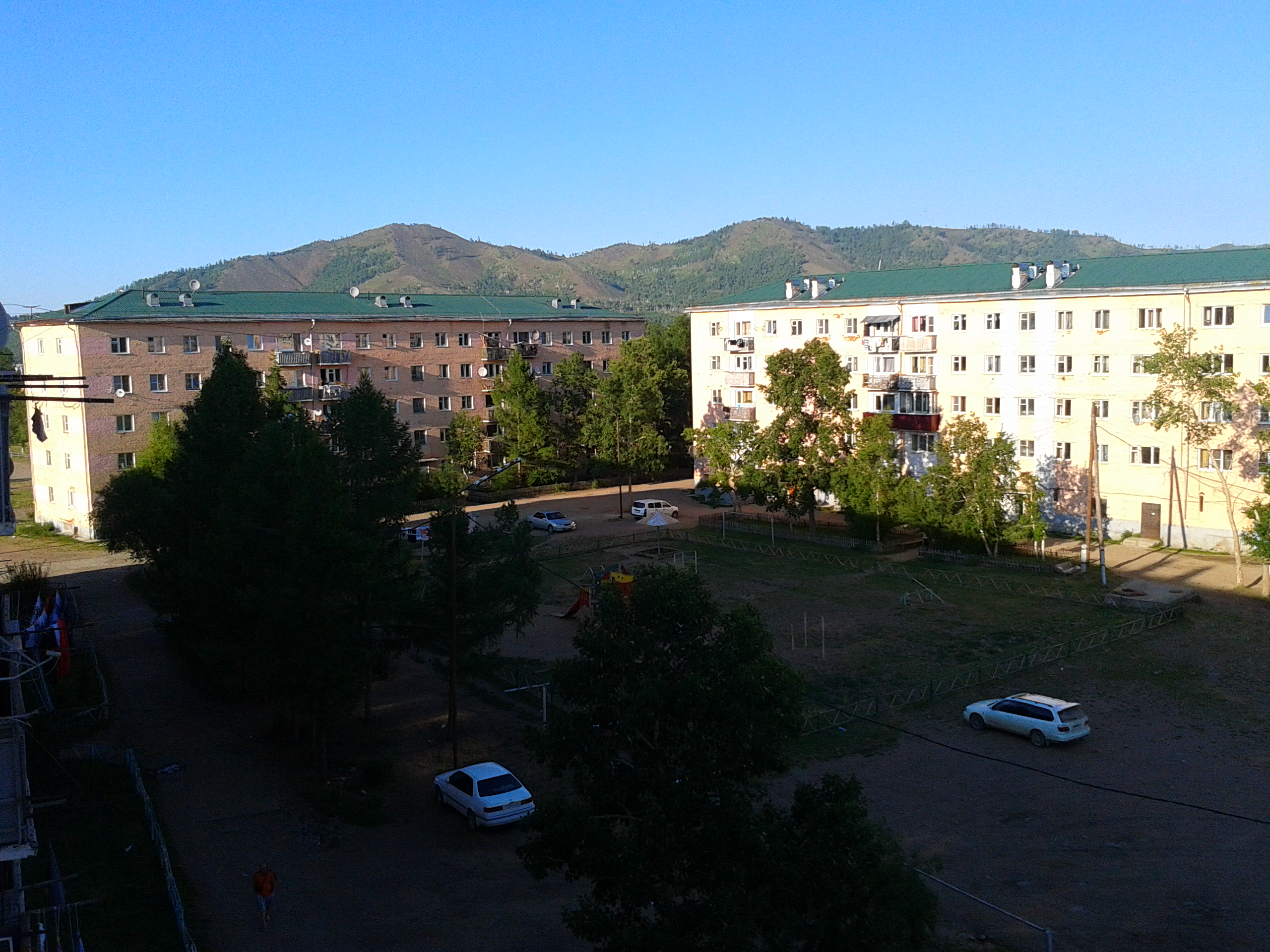 Вид на двор жилого квартала в городе Закаменск.